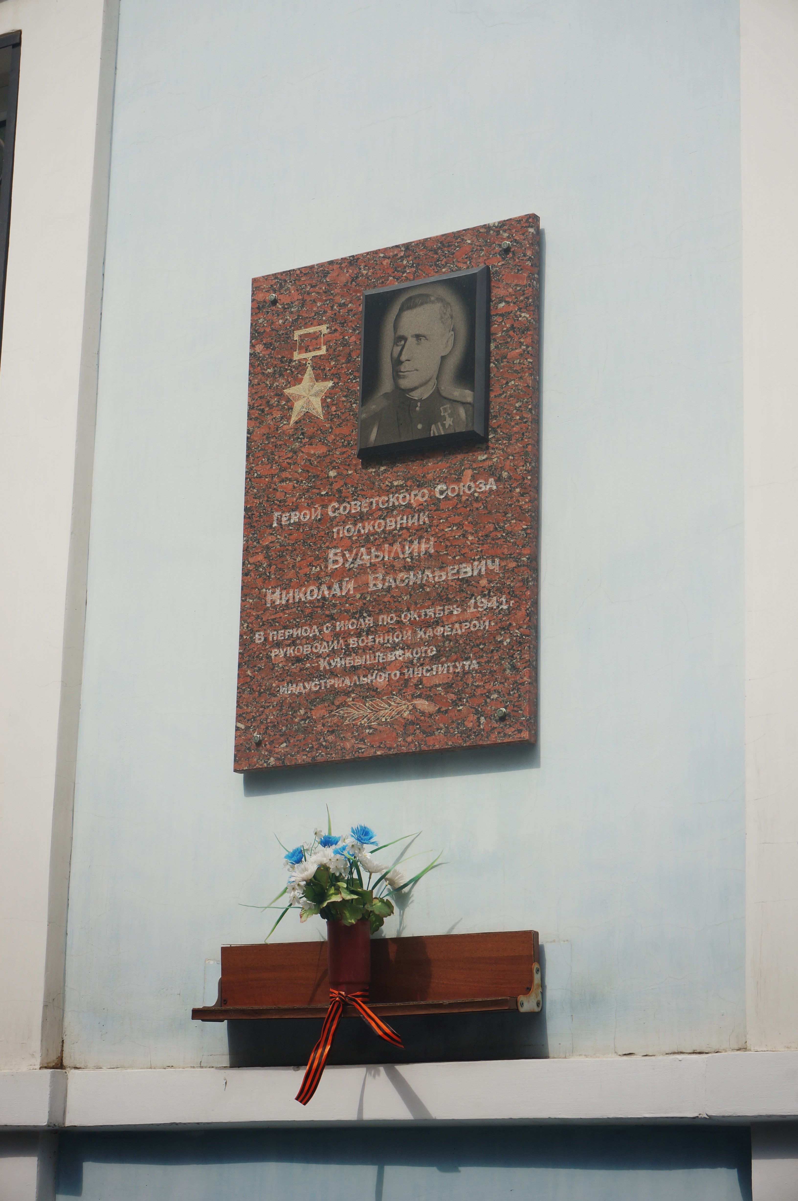 Бывшее здание Самарского архиерейского дома. Теперь здание СамГТУ. Мемориальная доска Герою Советского Союза Николаю Васильевичу Будылину, работавшему в институте